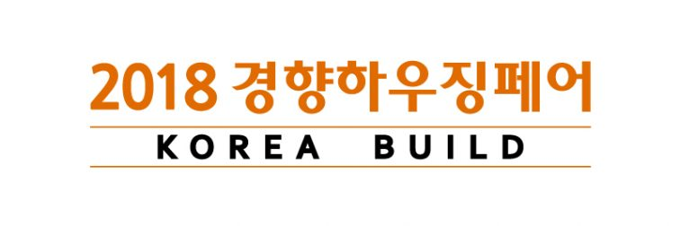 출처: 경향하우징페어